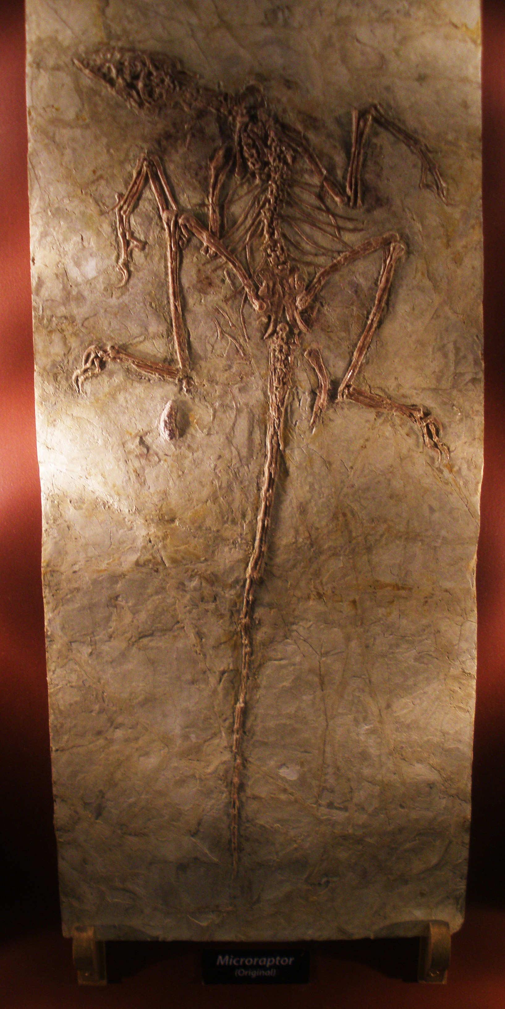 Fossil Microraptor zhaoianus